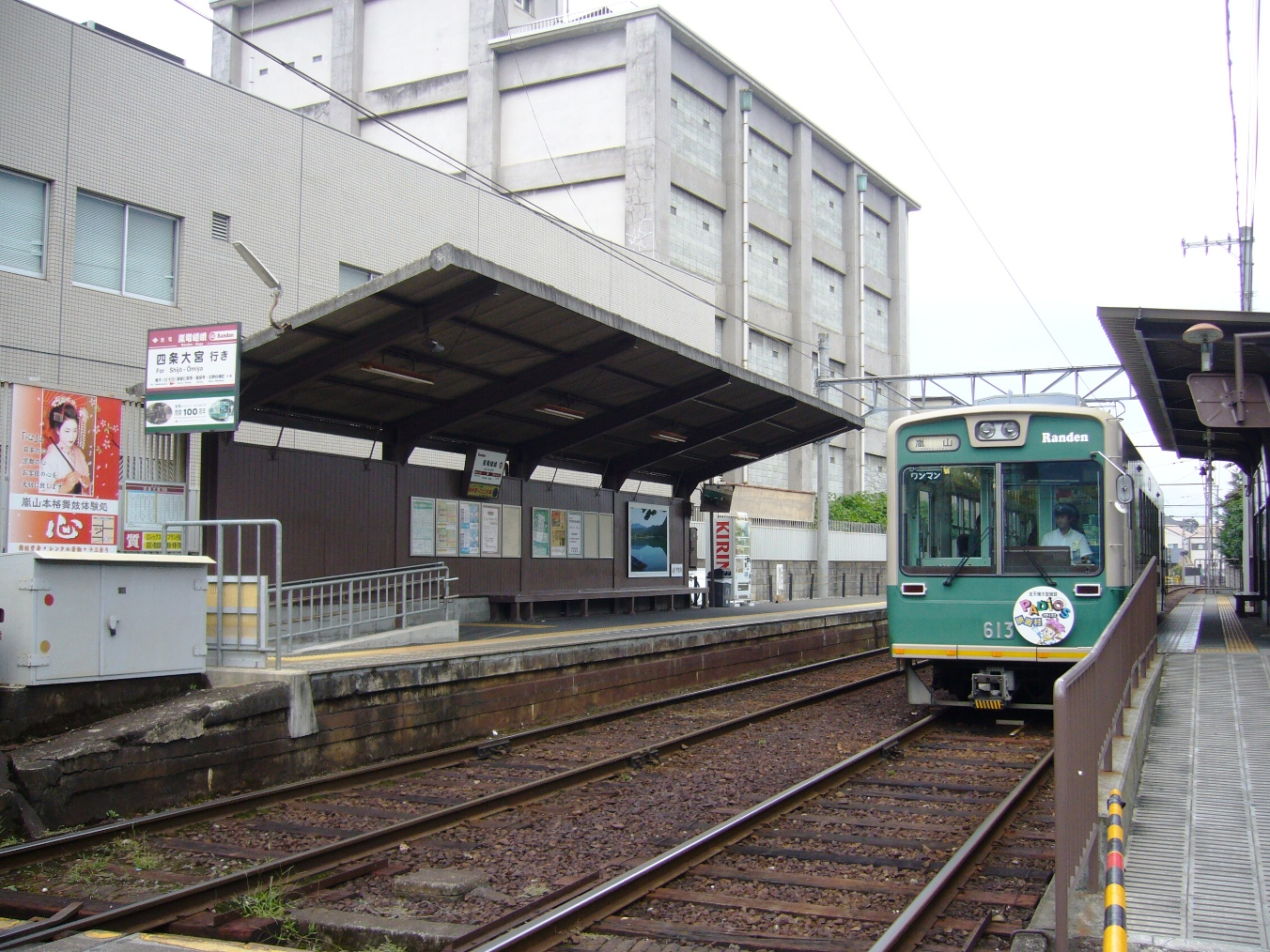 京福電気鉄道嵐山本線嵐電嵯峨駅。四条大宮駅行きホームには設置されたばかりの「嵐電界隈館」の写真パネルも見える。2007年9月27日に投稿者が撮影。